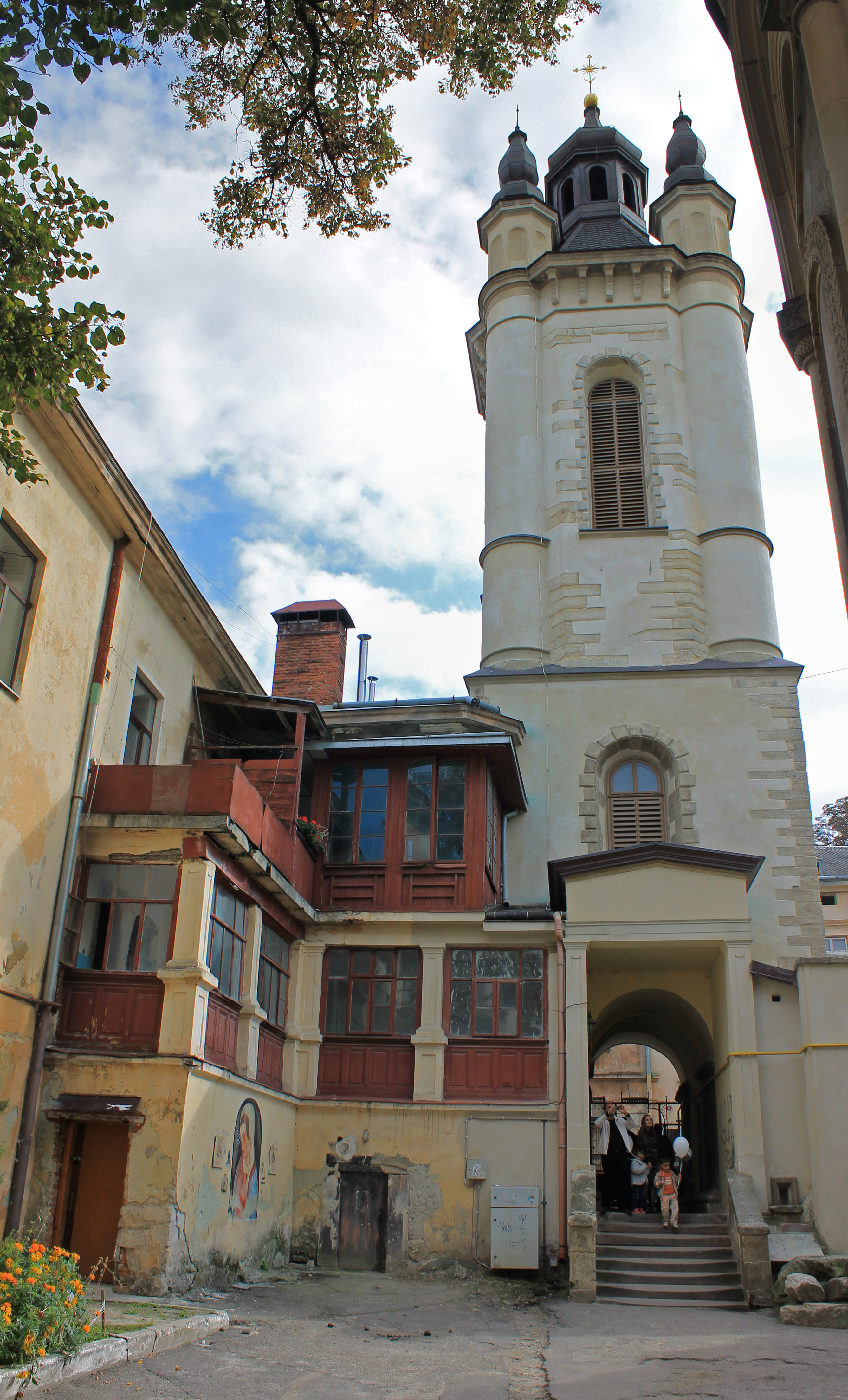 Дзвіниця Вірменського собору, вул. Вірменська,7, м.Львів.